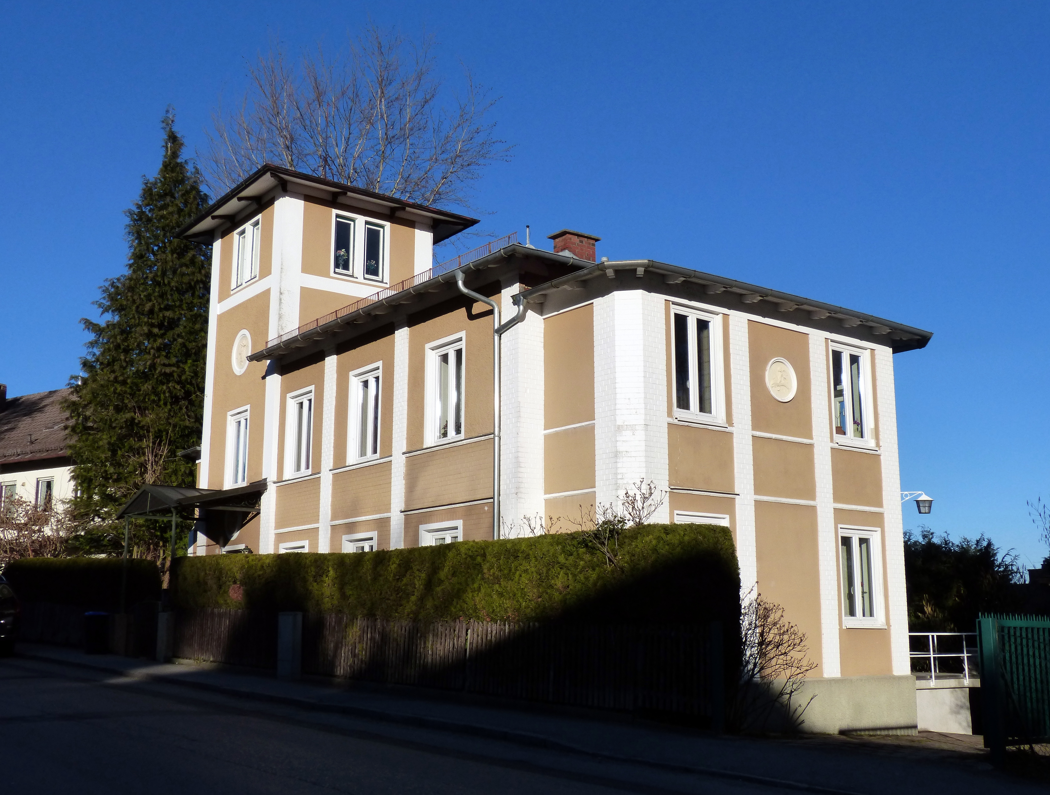 Pöcking, Feldafinger Straße 15, Villa Reber. Professor Franz von Reber (1834–1919), Kunsthistoriker an der Universität München, ließ sich 1895 in Pöcking einen Wohnsitz im Stil einer toskanischen Landvilla erbauen. Der zweigeschossige Walmdachbau verfügt über einen Belvedereturm; Eingangsvordach und Eisenbalkon stehen auf gusseisernen Stützen.